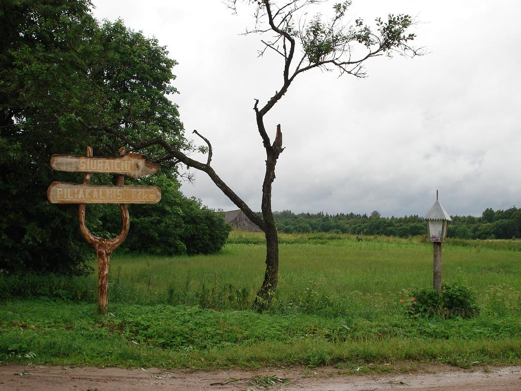 Šiuraičių piliakalnis